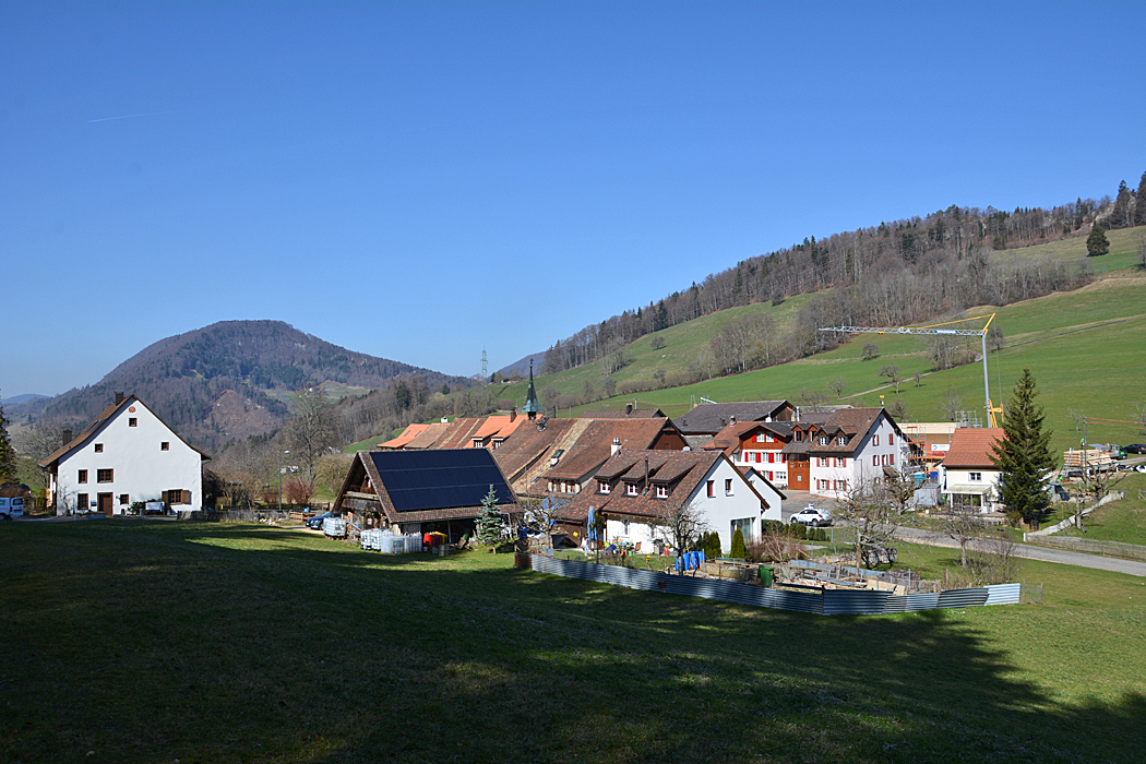 Bärenwil bei Langenbruck, Basel-Landschaft